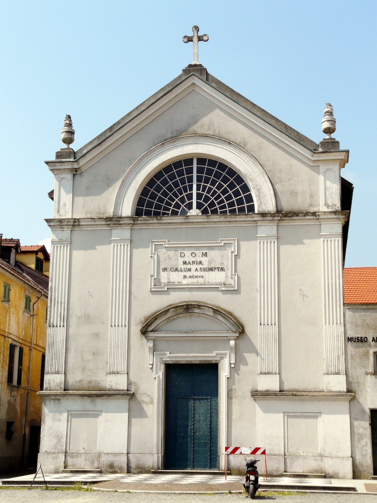 Oratorio della Natività di Maria Santissima, Masone, Liguria, Italia